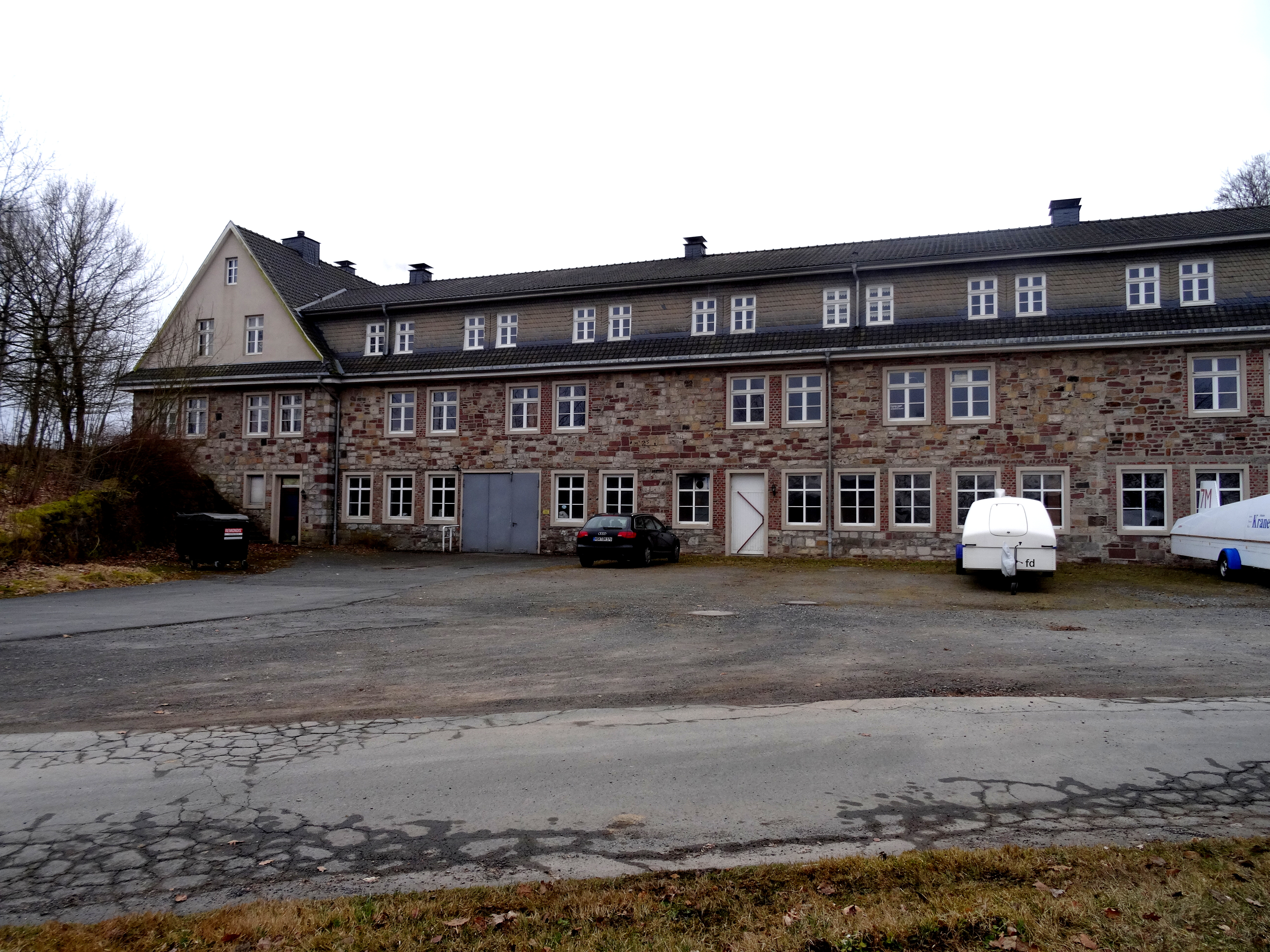 Ehemalige Segelfliegerschule Schüren